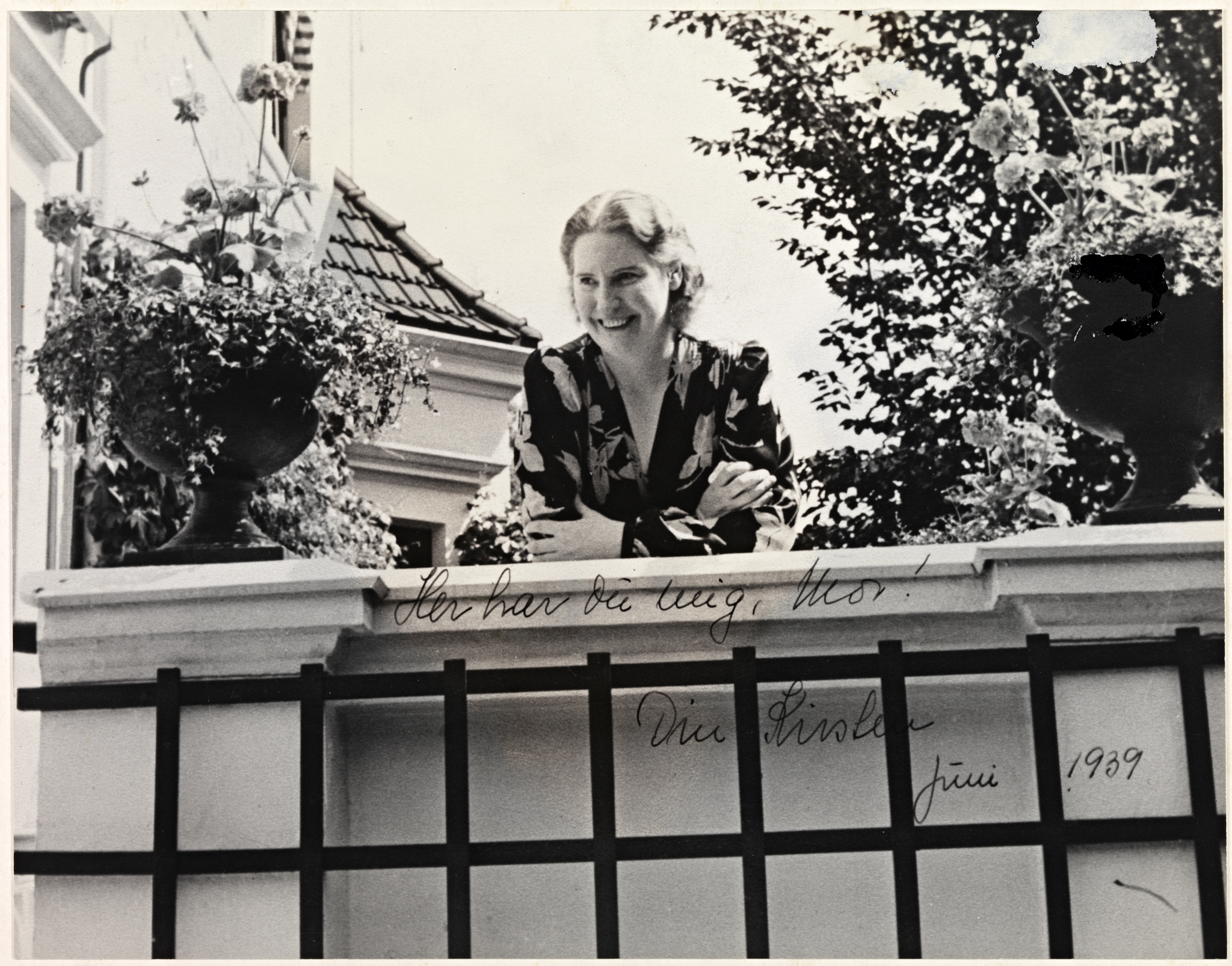 Tittel / Title: Portrett av Kirsten Flagstad (1895-1962) Beskrivelse / Description: Fotografiet er tatt på Kirsten Flagstads veranda i Tidemands gate 6, Oslo. Dedikasjon på bildet: "Her har du mig, Mor! Din Kirsten Juni 1939" (Bildet er tatt 3 år før Kirsten sendte det til sin mor). Dato / Date: 1936 Fotograf / Photographer: ukjent / unknown Sted / Place: Tidemands gate 6, Oslo Eier / Owner Institution: Nasjonalbiblioteket / National Library of Norway Lenke / Link: Bildesignatur / Image Number: blds_05750